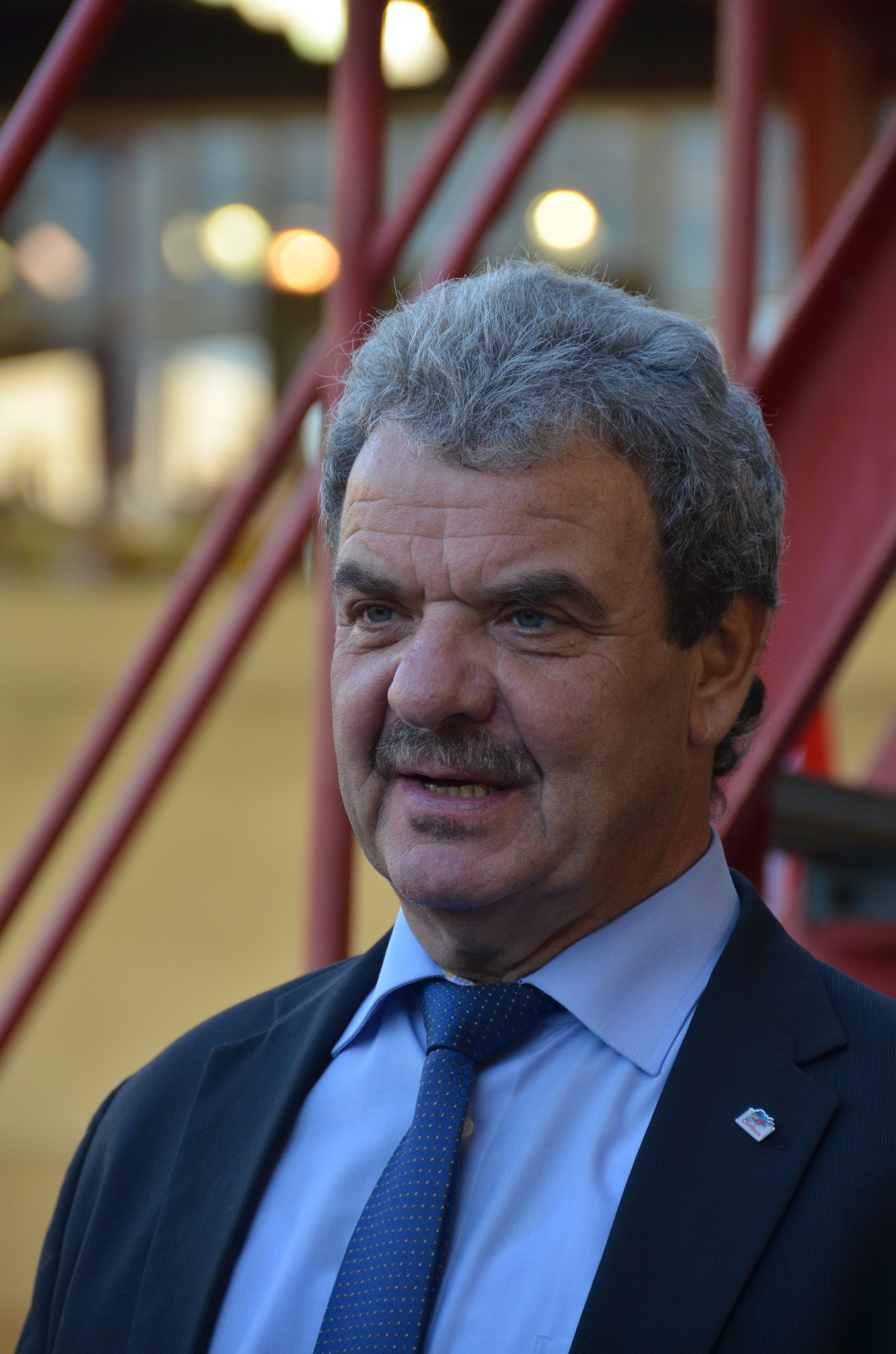 Frank Szymanski, Oberbürgermeister von Cottbus 2008